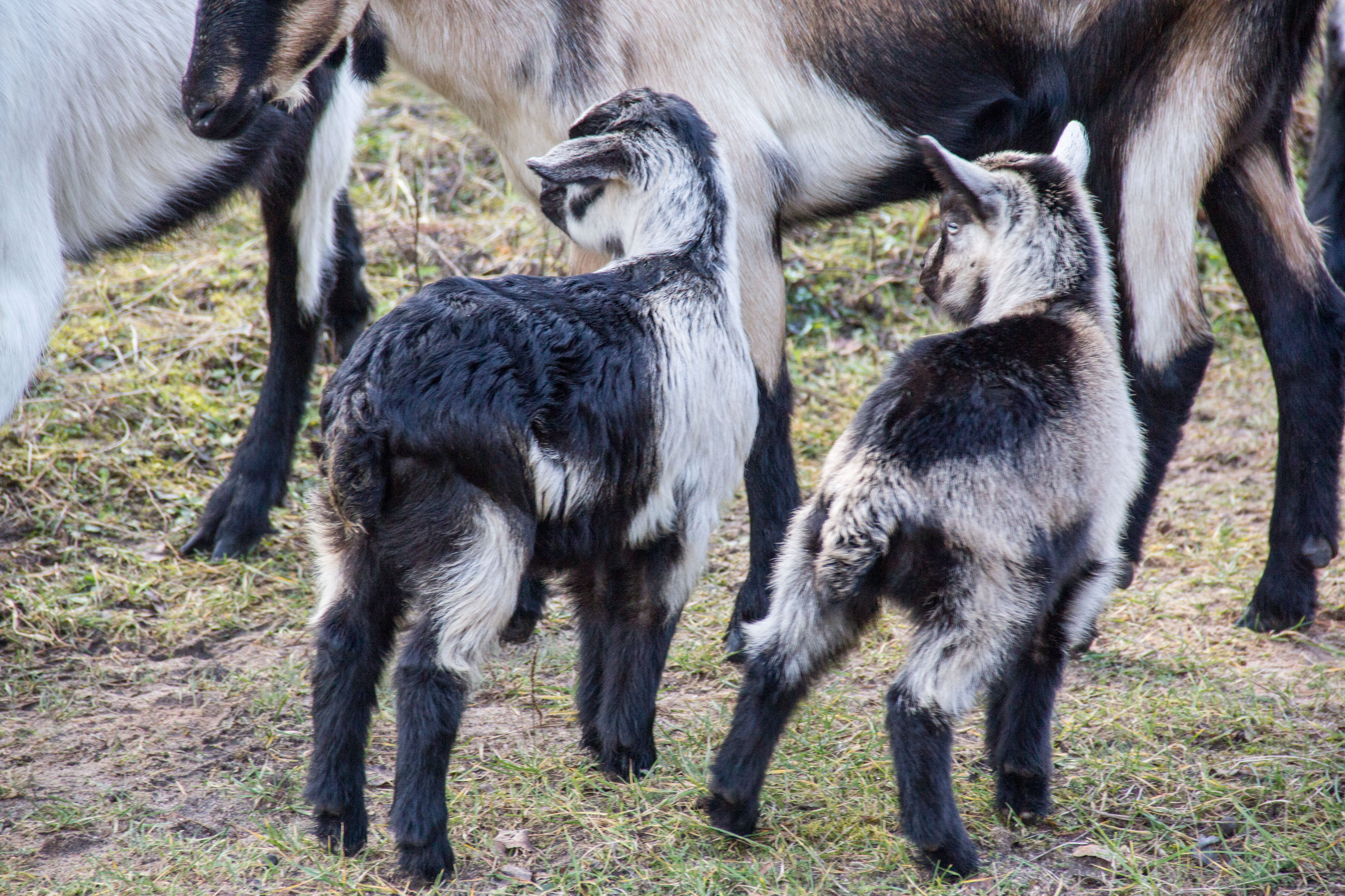 Pfauenziegen im Naturschutzgebiet Tennenloher Forst, Mittelfranken